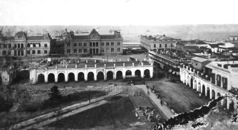 Demolición de la Recova de Buenos Aires, que dividía la actual Plaza de Mayo desde 1801. Gracias a la iniciativa del intendente Torcuato de Alvear, la vieja Plaza Mayor volvió a unificarse.